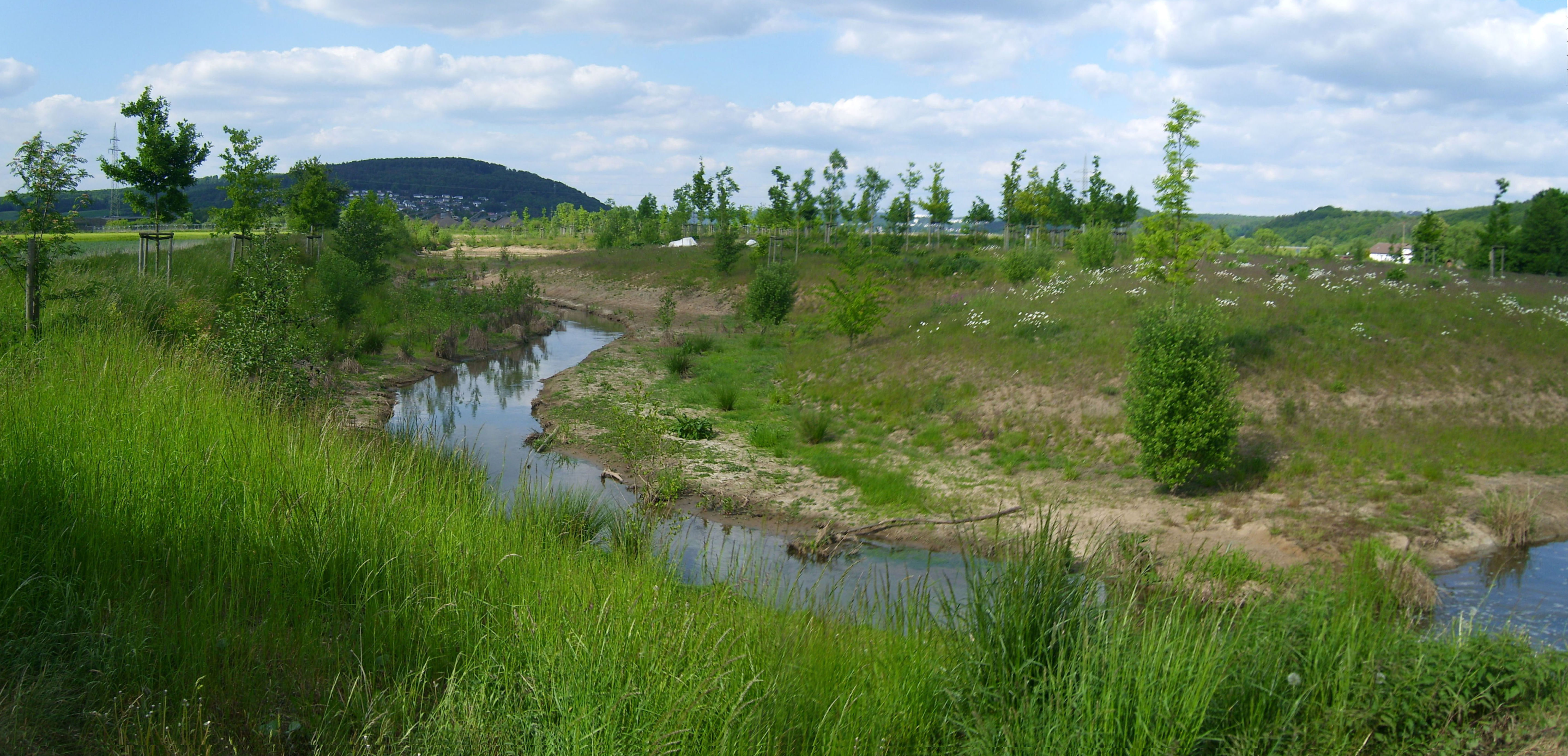 Die Par-Allna (westlicher Arm) bei Argenstein; im Hintergrund der Weimarsche Kopf, südlichster Berg des Marburger Rückens mit Niederweimar an seinem Fuße.